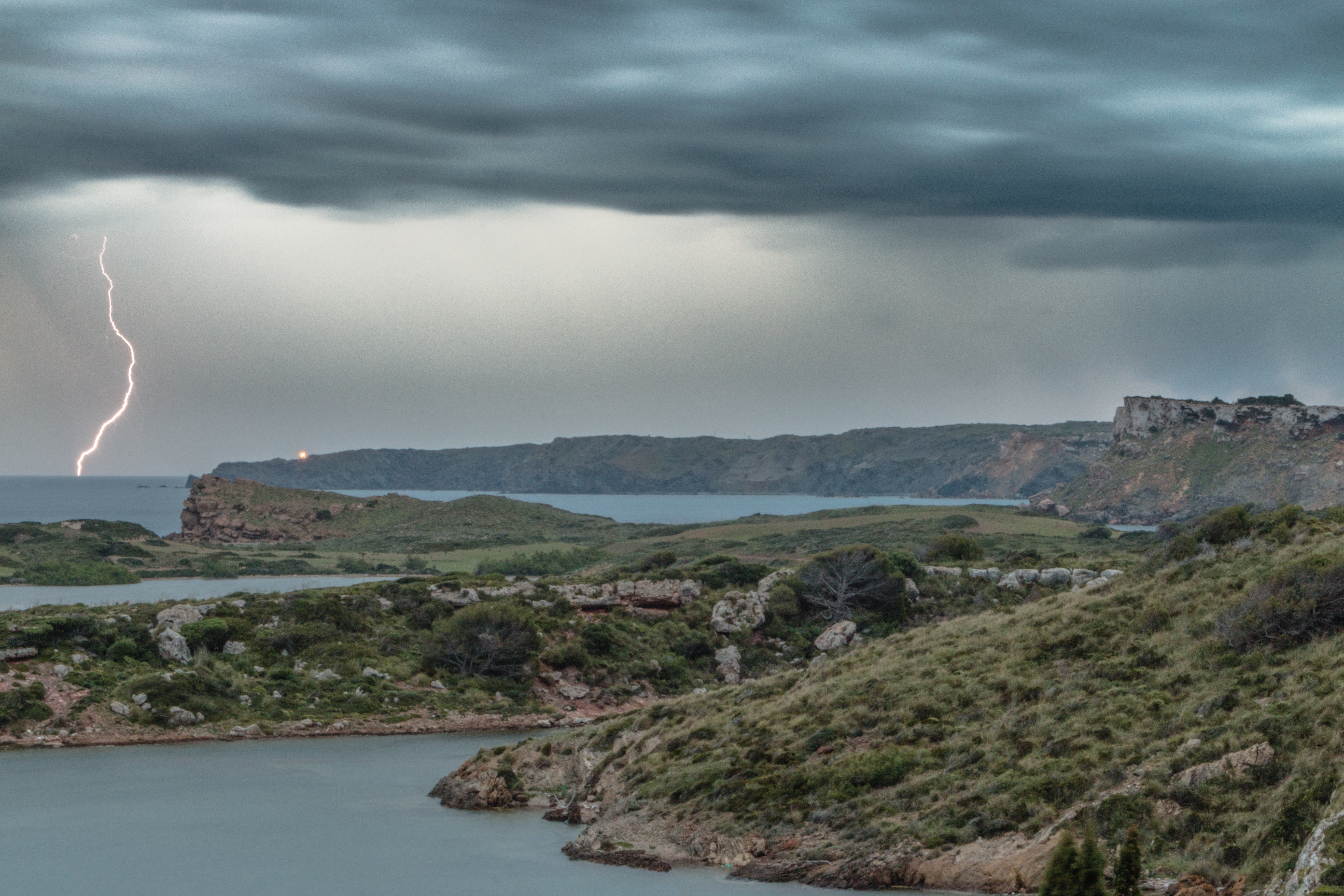 Thunderstorm Strikes Minorca